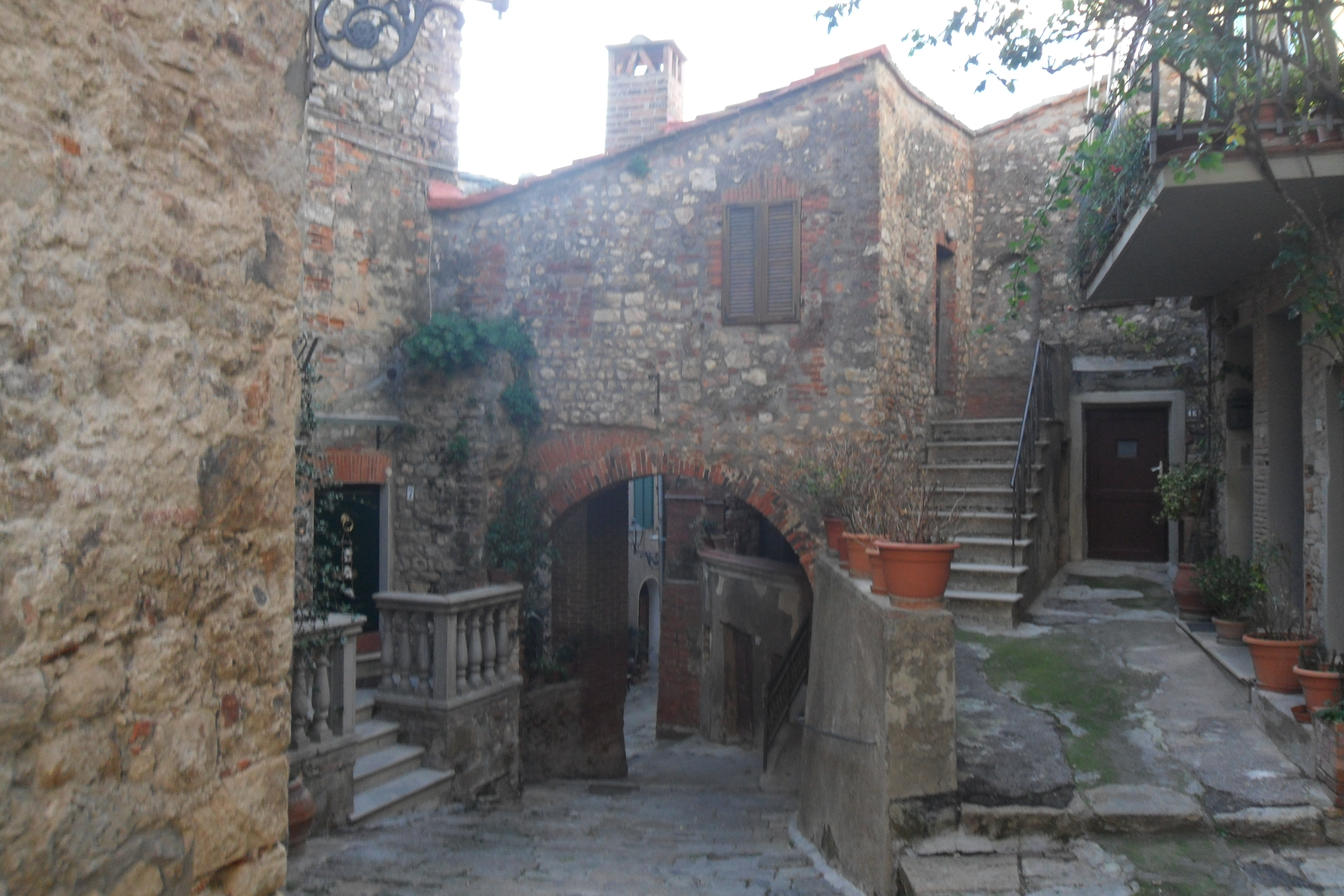 "scorcio" di Gavorrano